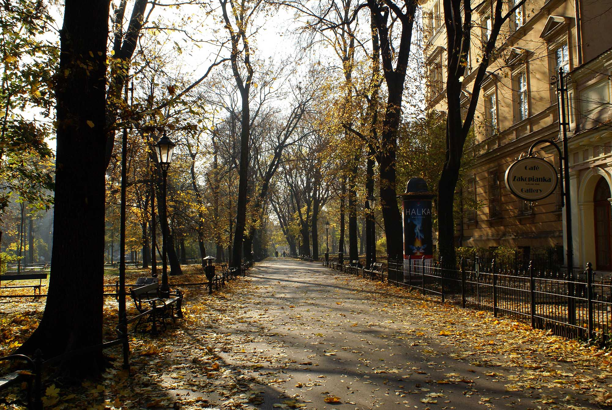 Kraków, Planty, 1820-1830